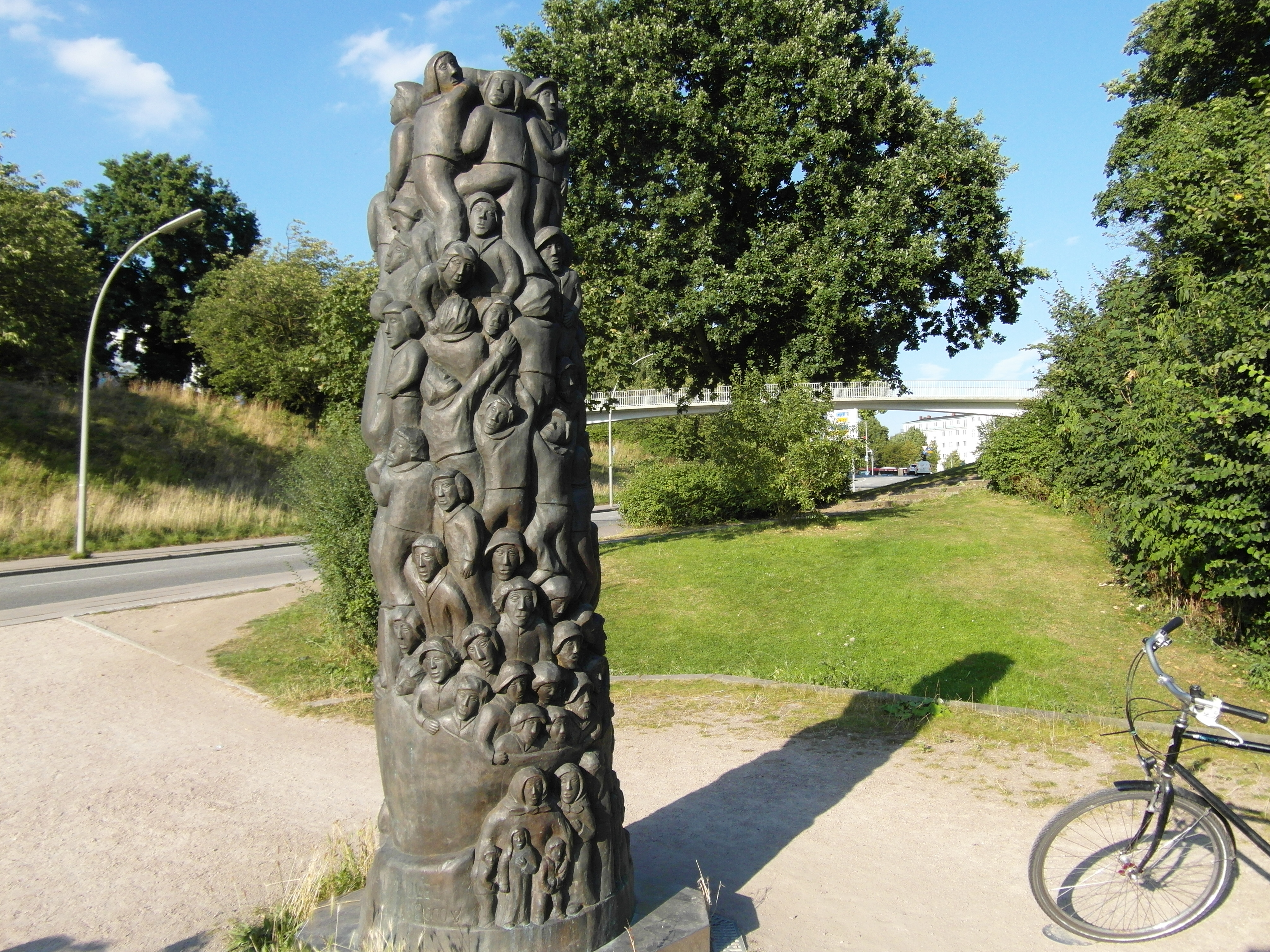 "Die Auswanderer", ein Denkmal der kroatischen Bildhauerin Ljubica Matulec aus dem Jahr 1989 im Hamburger Hafen. Von der Hafenseite aus gesehen.